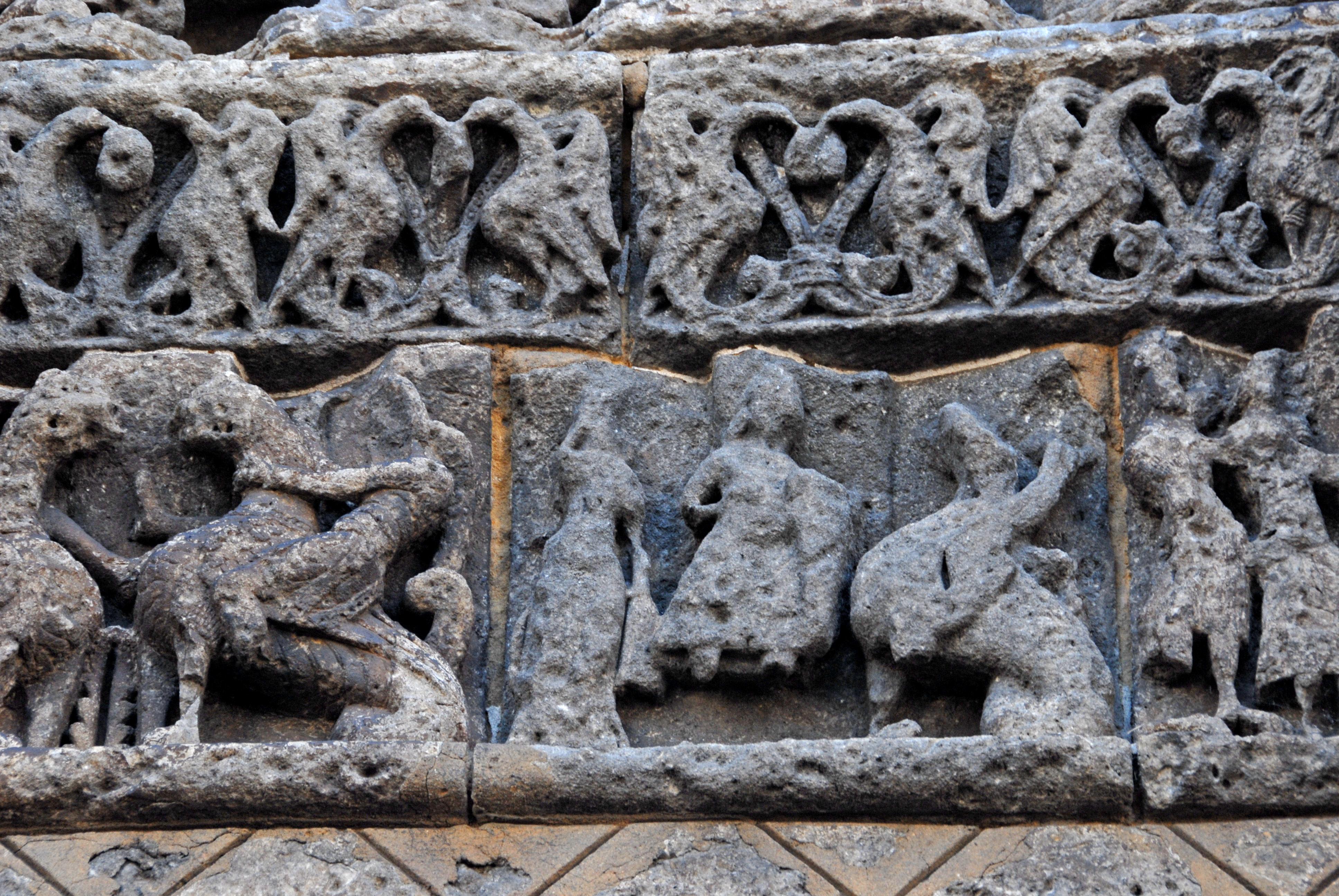 St-Pierre de Pont-l’Abbé-d’Arnoult (17), Detail Scheinportal, Band unter Tympanon